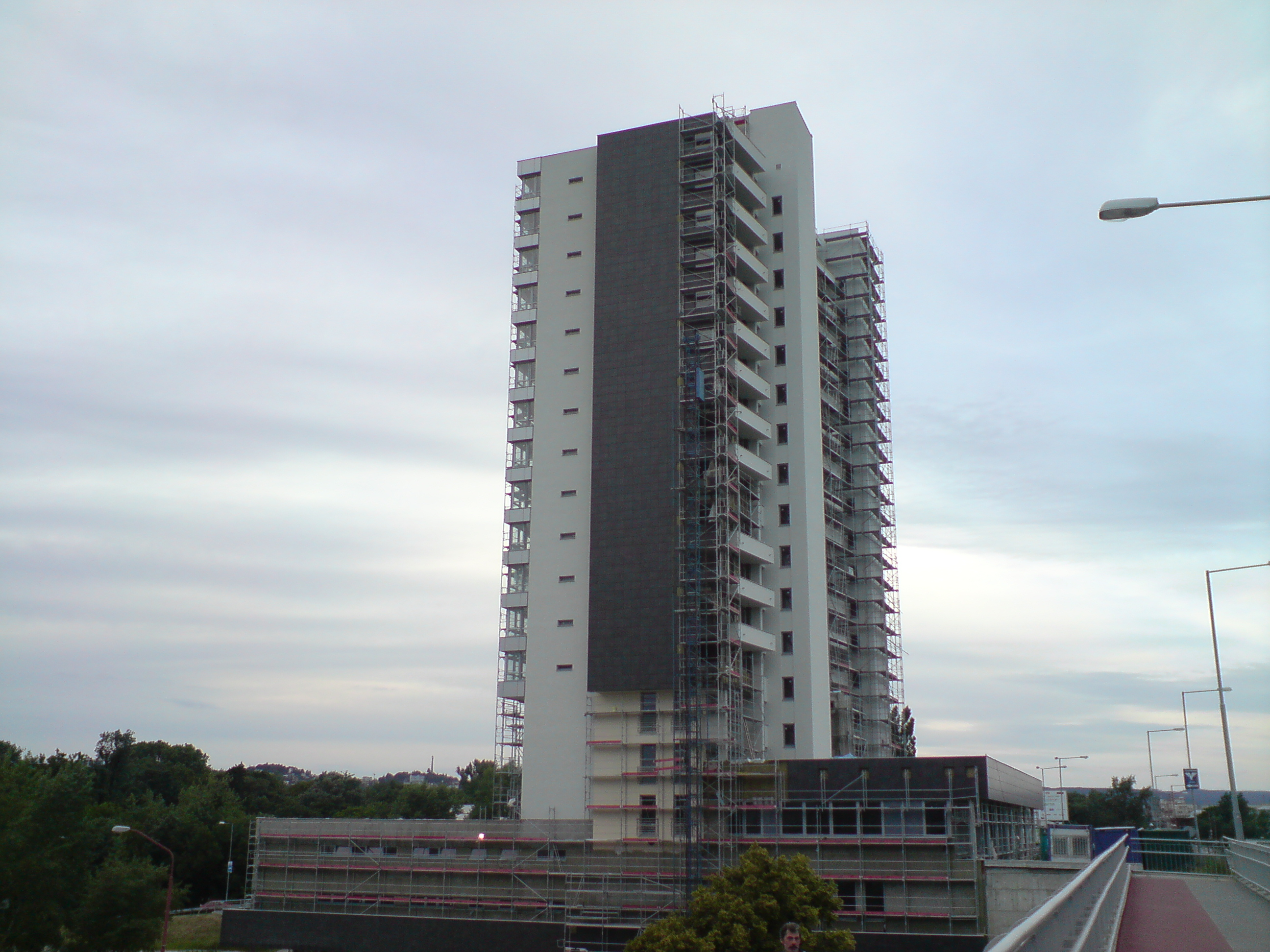 Petržalka